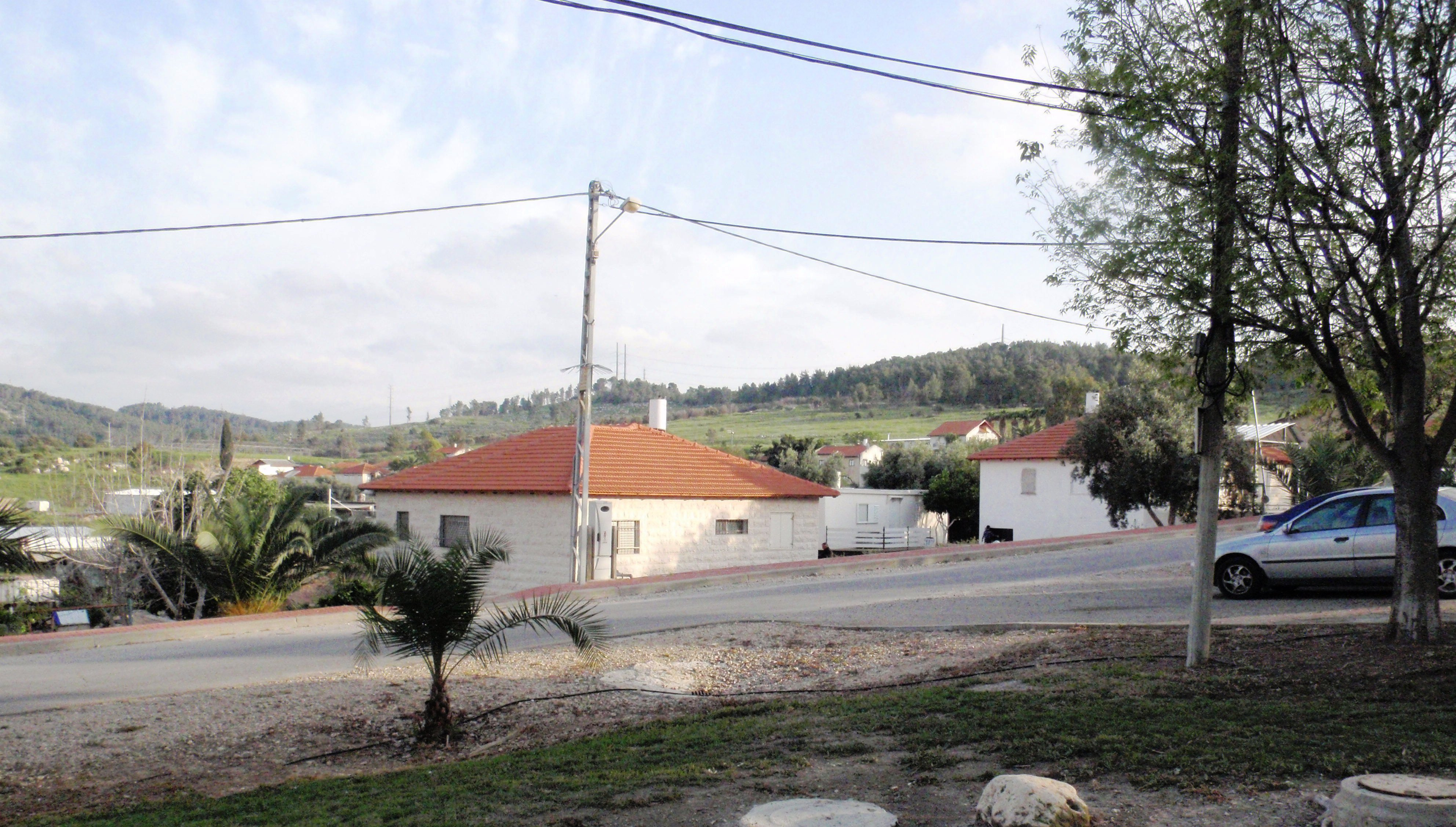 Moshavim מושב זנוח מבט כללי